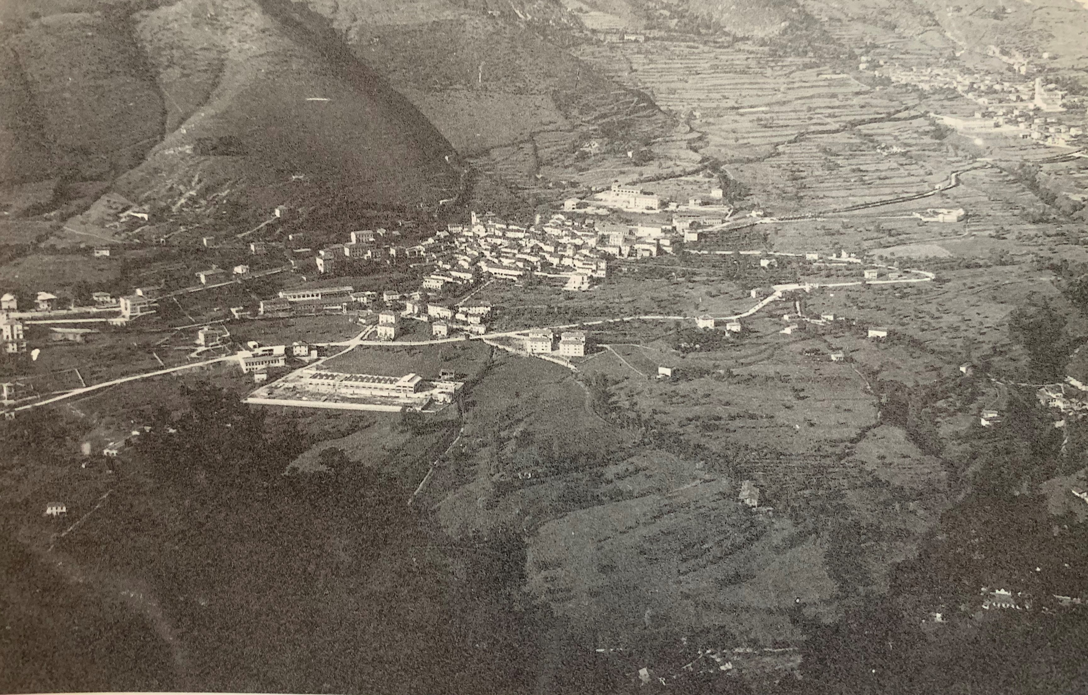 Vecchia foto rppresentante San Sebastiano e Sant Appollonio